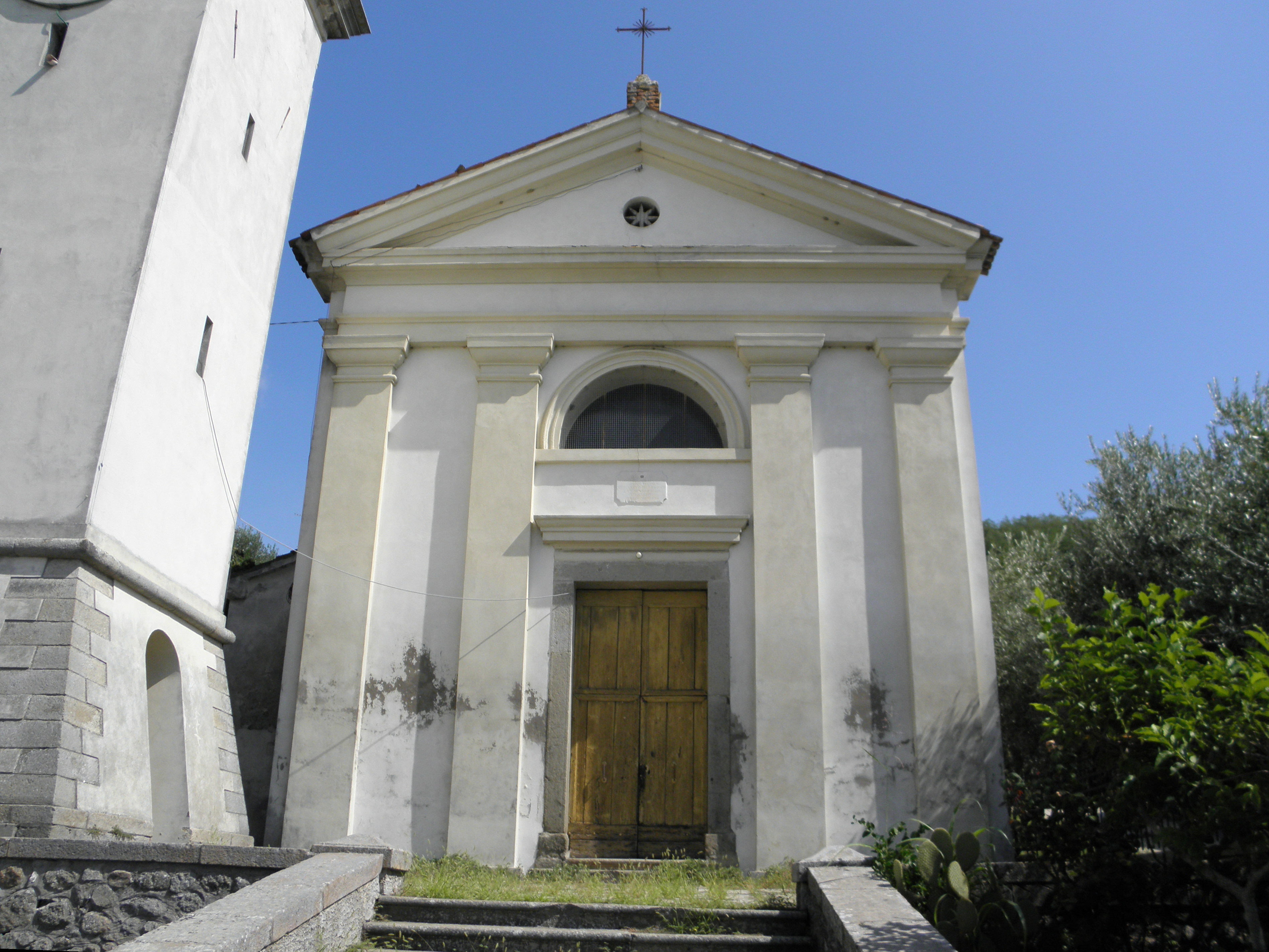 Cornoleda, località del comune di Cinto Euganeo: la chiesa dei Santi Nazario e Celso.